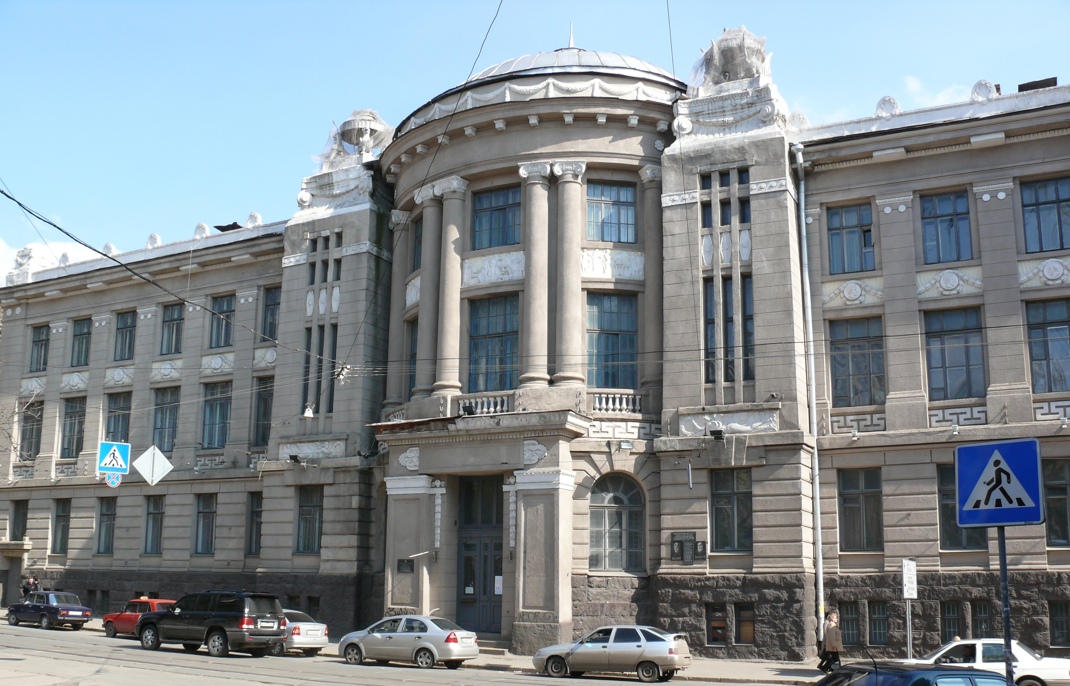 Mechnikov medical institute, Kharkov. 1913 Бактериологический (Пастеровский) институт и Харьковское медицинское общество. Улица Пушкинская, 14. Ныне (с 1920-х годов) называется Институт (микробиологии,) вакцин и сывороток имени Мечникова. Здание построено специально для института в 1913 году академиком архитектуры А.Н. Бекетовым в стиле классицизм с элементами модерна. На здании висит мемориальная доска.